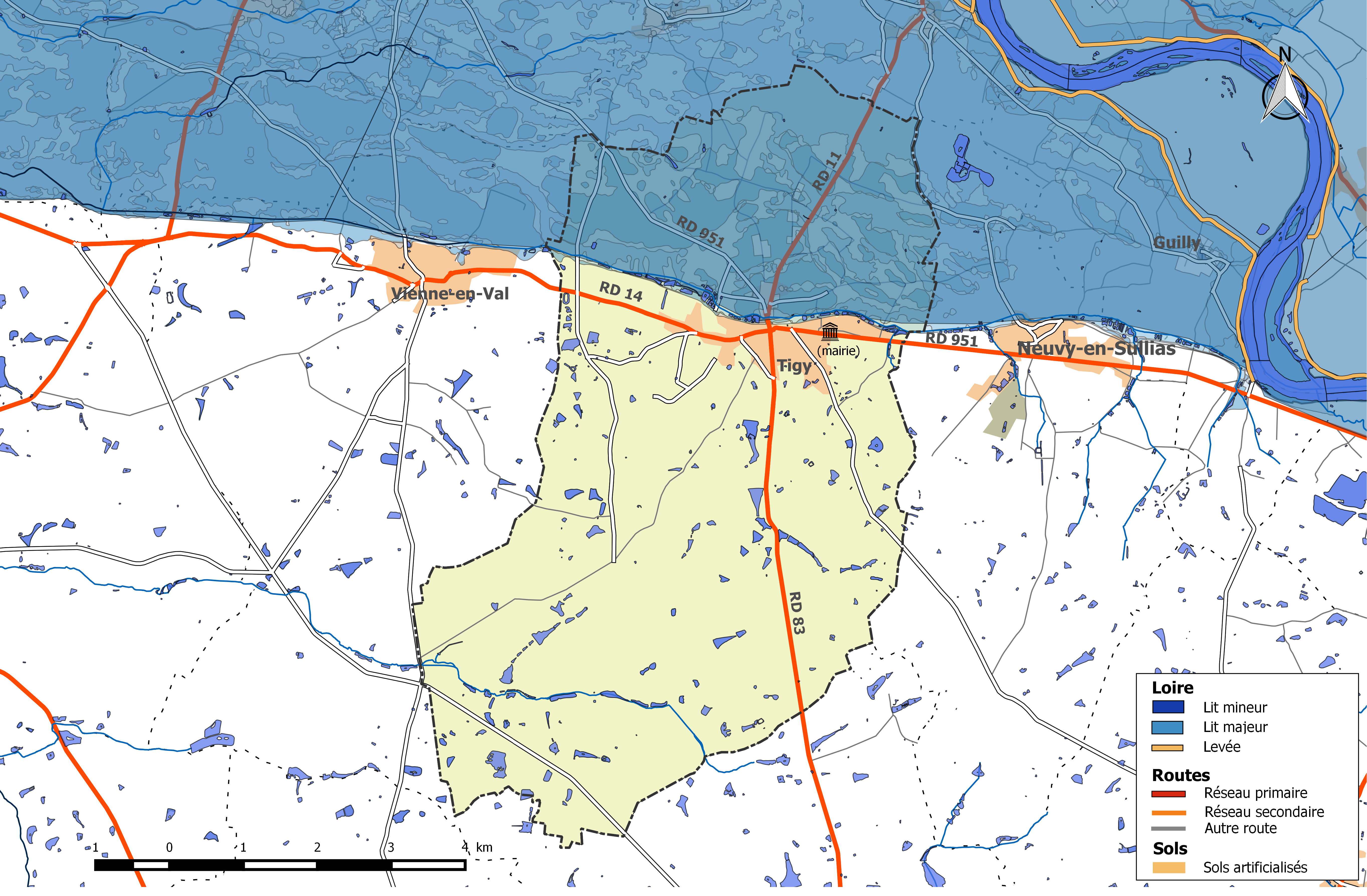 Zone inondable et réseaux hydrographique et routier de la commune de Tigy.